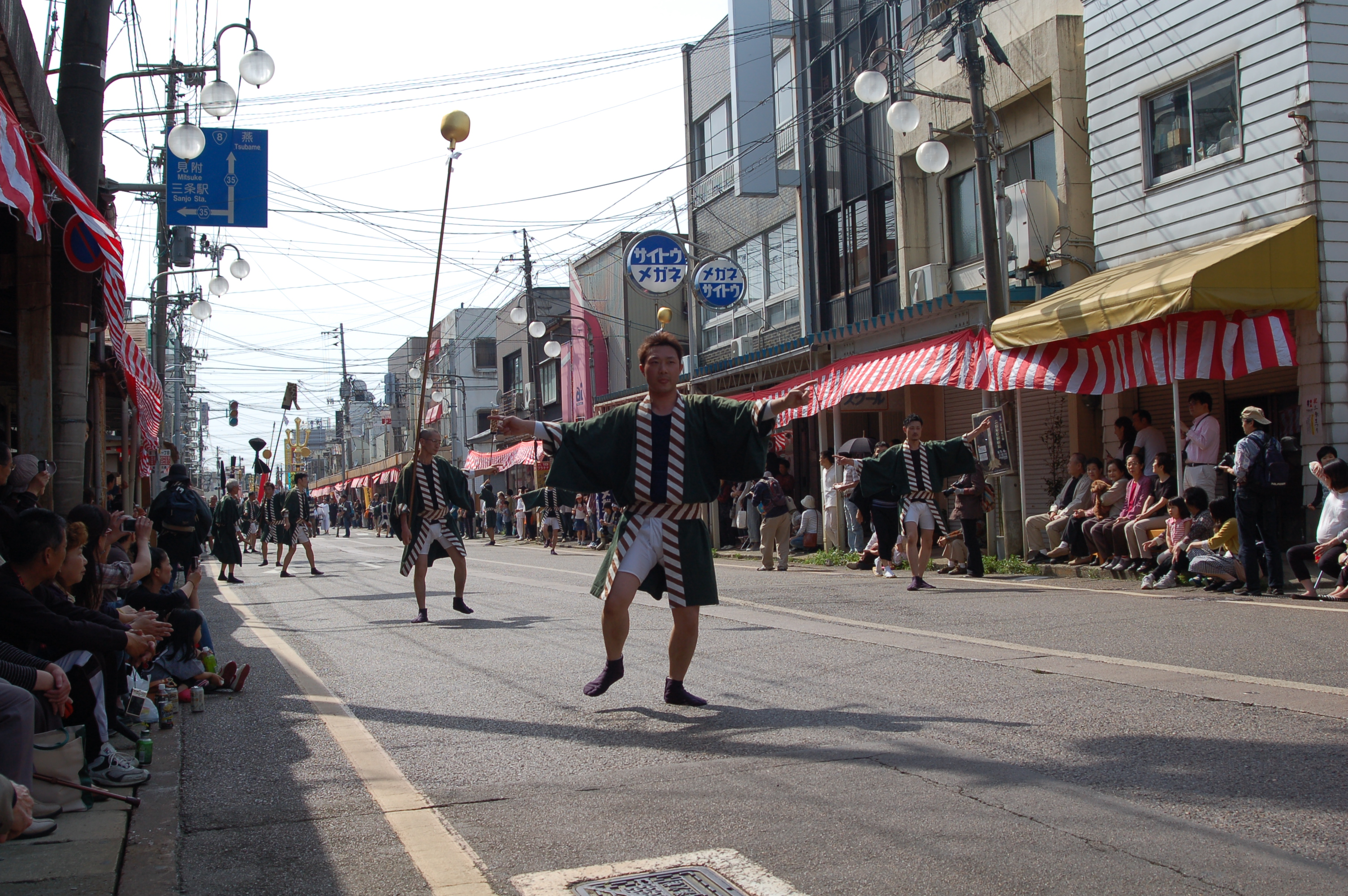 大名行列の先頭を進む先供（やっこ）